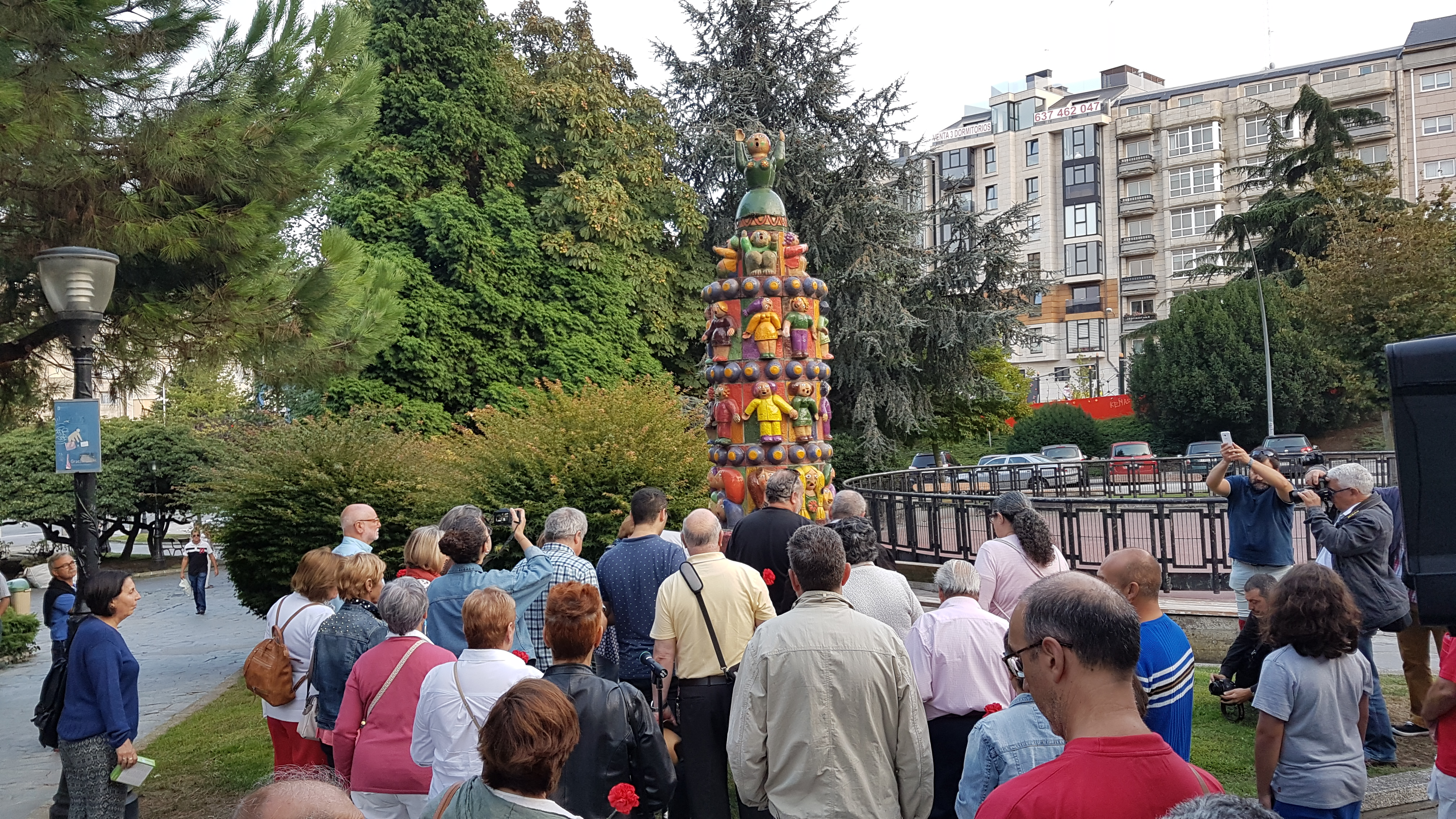 Acto de homenaxe a Alexandre Bóveda no Día da Galiza Mártir, diante do seu monumento na Coruña.